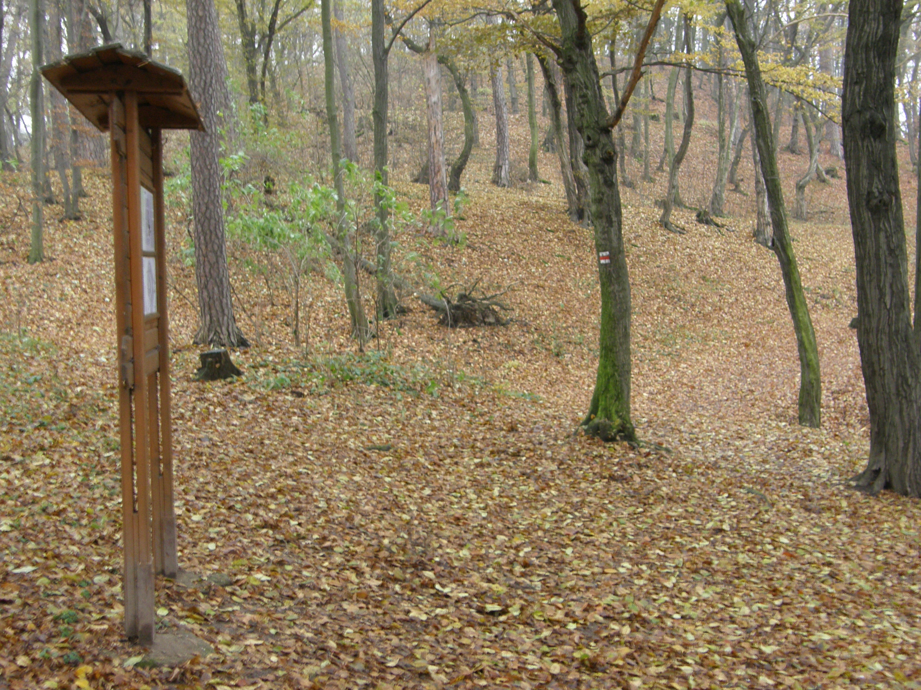 Informační panel, v pozadí nepatrné valy boskovické bašty